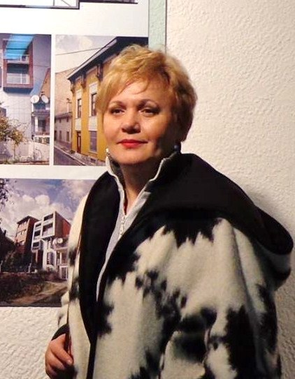 Jasmina Hanjalić, 2015. Српски (ћирилица): Јамина Хањалић, 2015